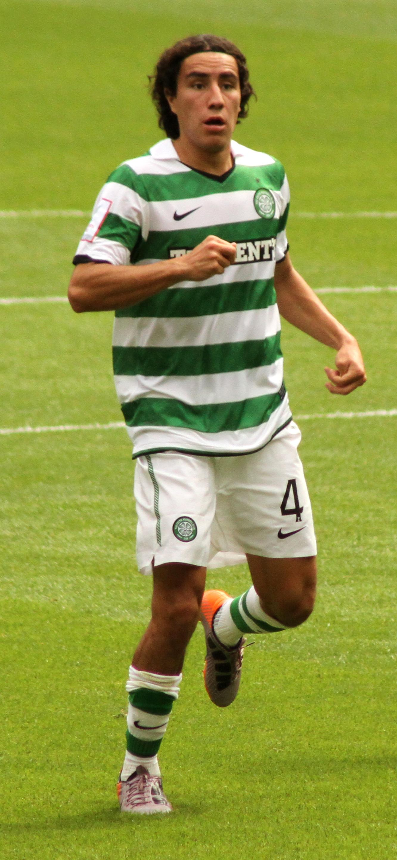 Dejan Lovren, Efrain Juarez & Kim Kallstrom